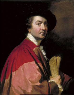 Self-portrait